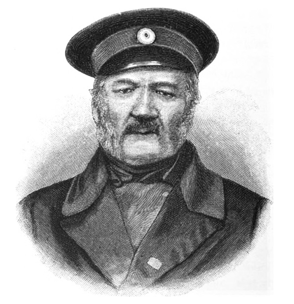 Fredrik Tigerstedt